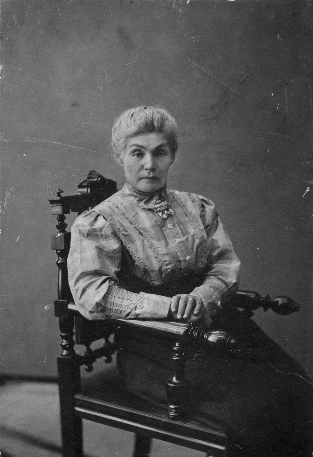 Жена революционера-народника Тимофея Афанасьевича Франжоли в Вятке